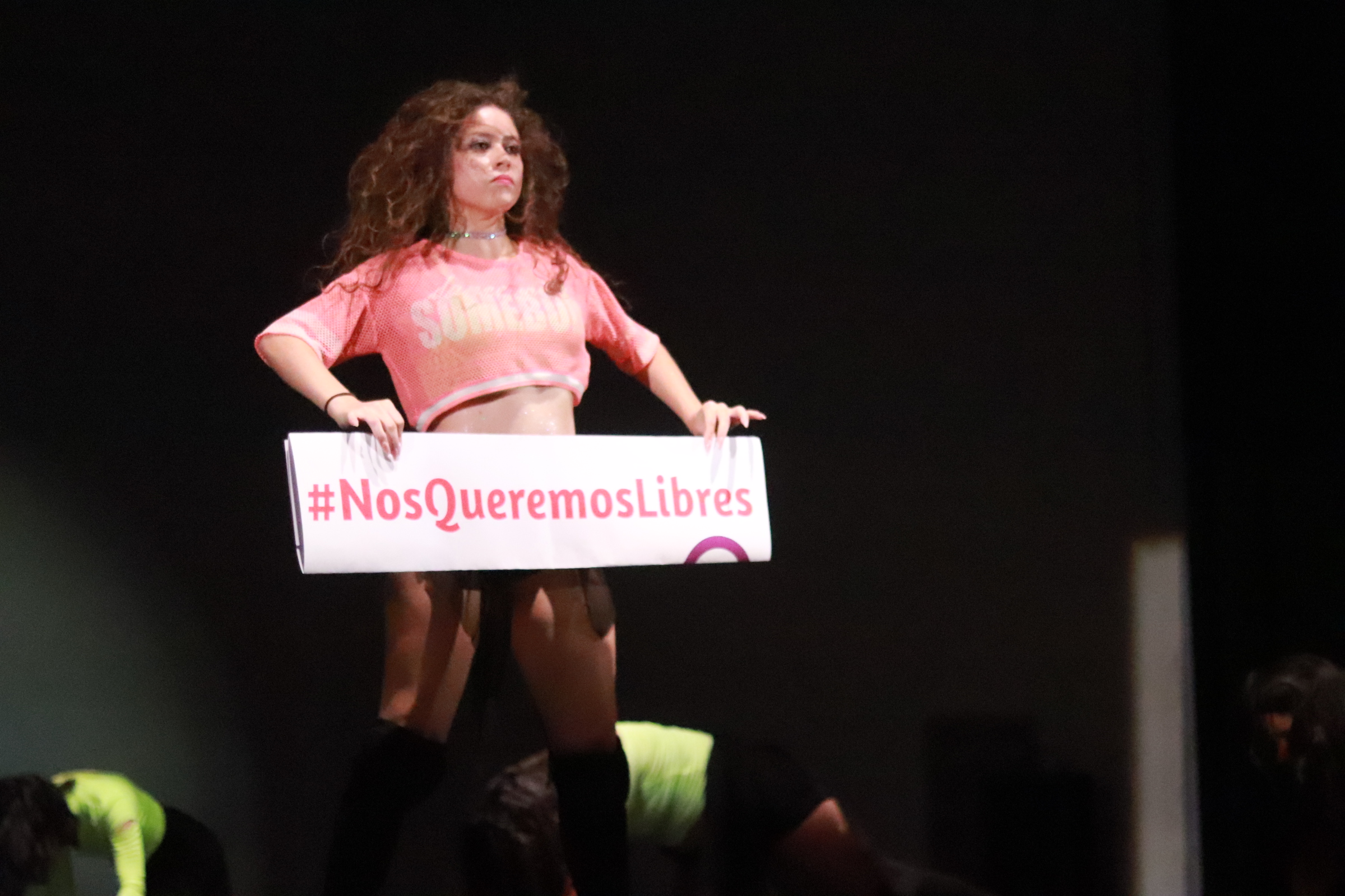 Mujer protestando a través de la danza fotografía de @gustavoarroyofotos en su proyecto sobre las protestas sociales emergentes en México de mujeres por la desaparición y abuso de género en el país.